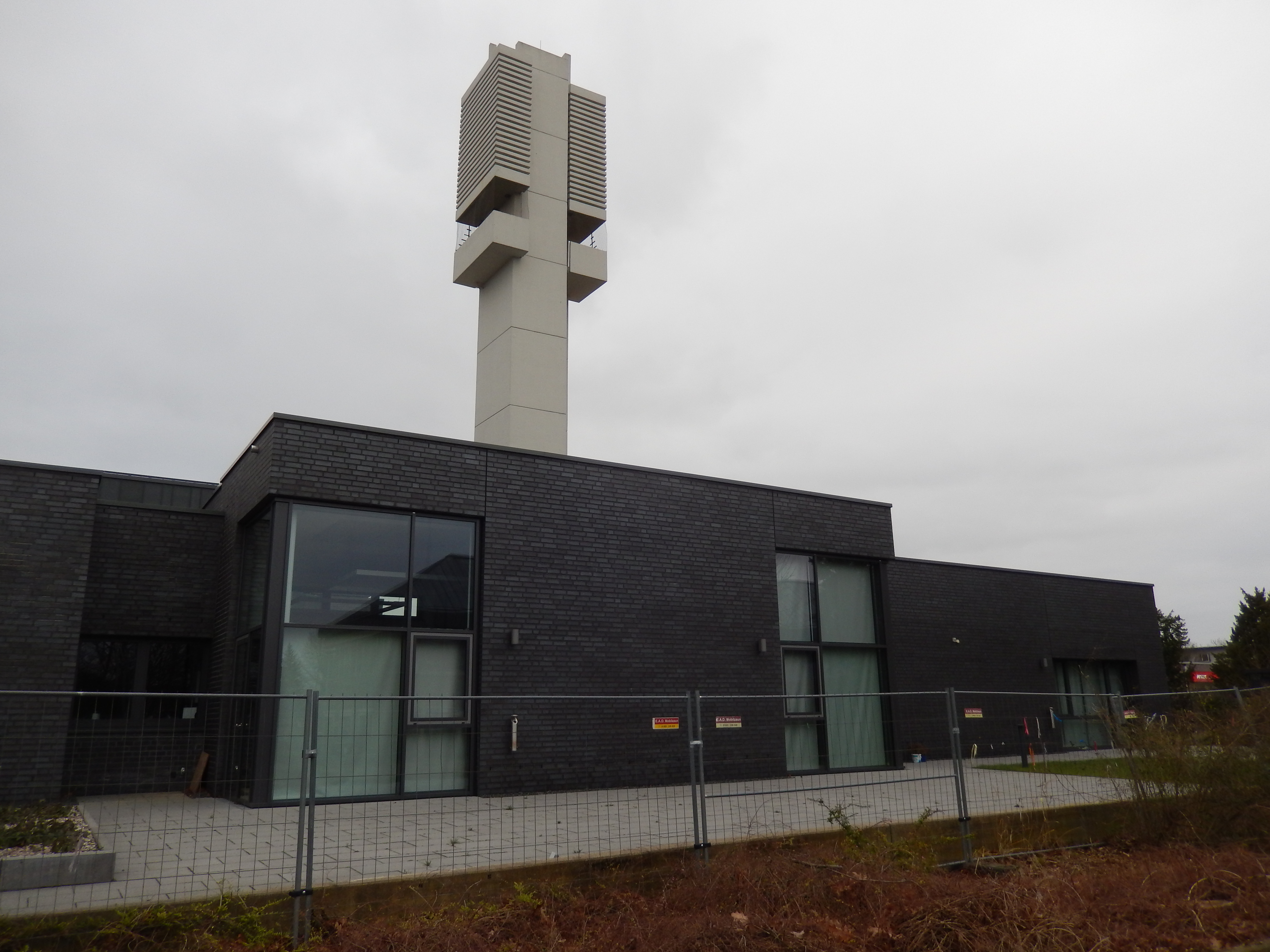 Willehadi-Kirche in Garbsen, Neubau, Zustand Dezember 2016